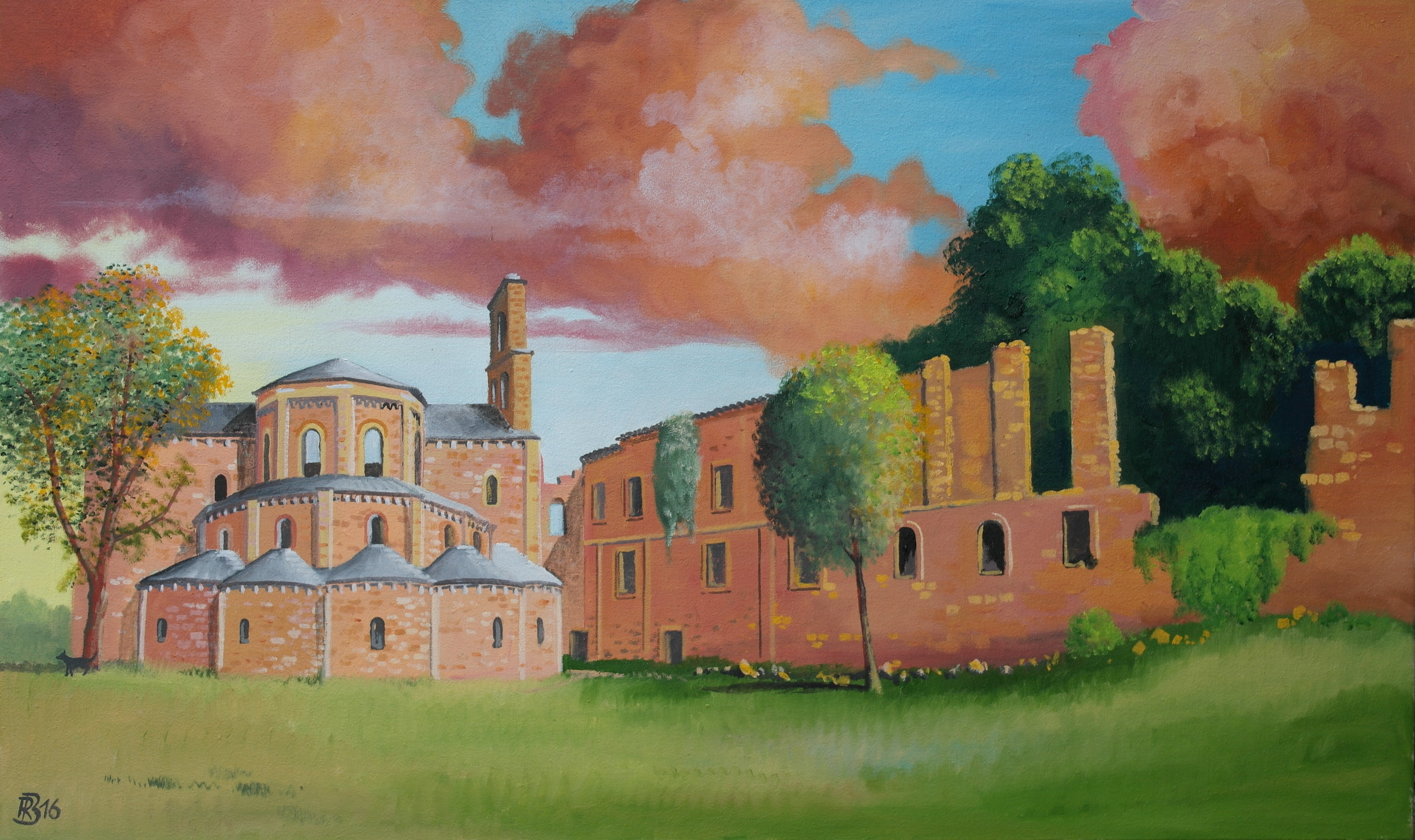 Reinhard Bergmann: Kloster Moreruela, 2016, Öl/Leinwand 100x60 cm, aus der Serie „Stätten der Zisterzienser“